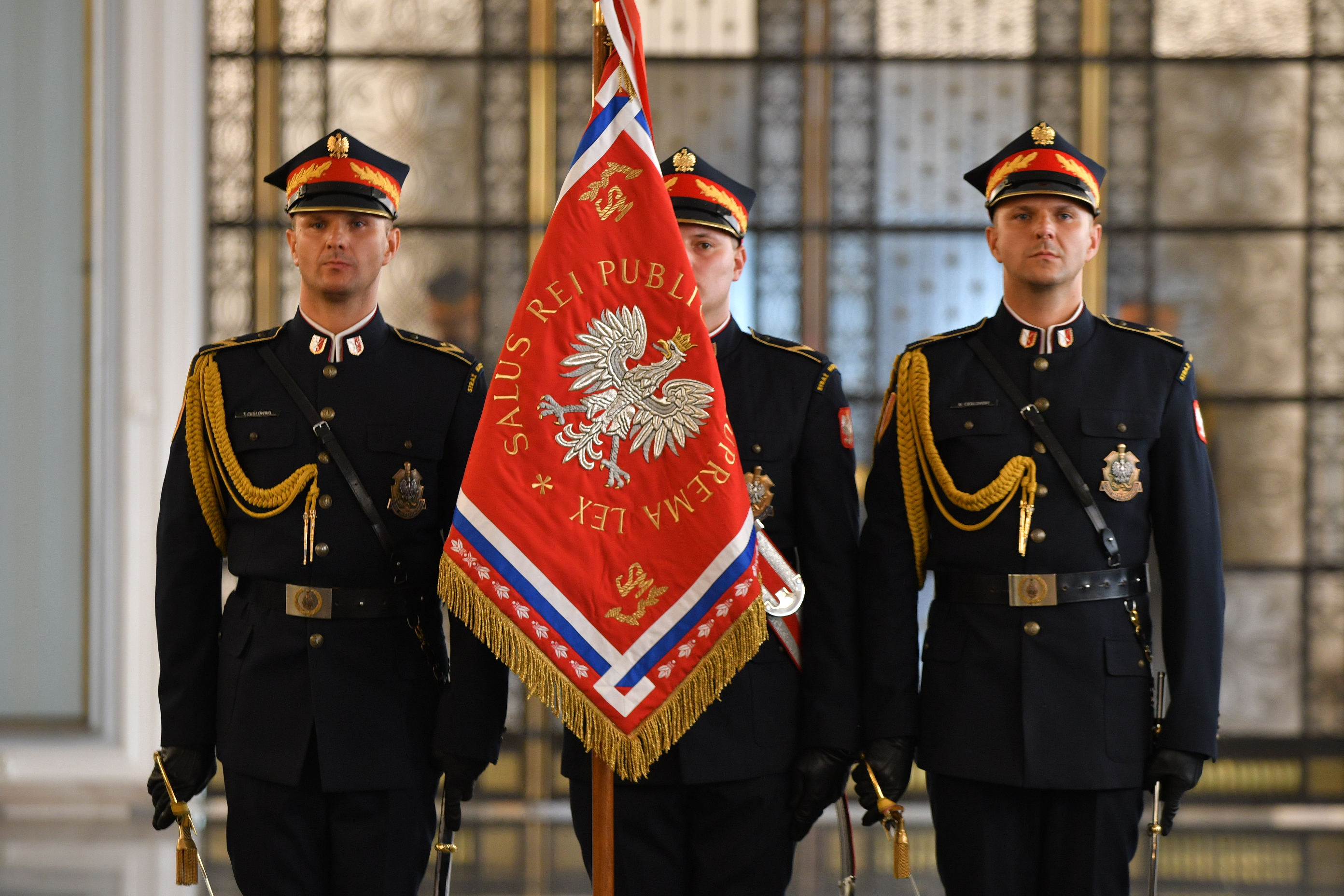 Straż Marszałkowska w Sejmie RP.